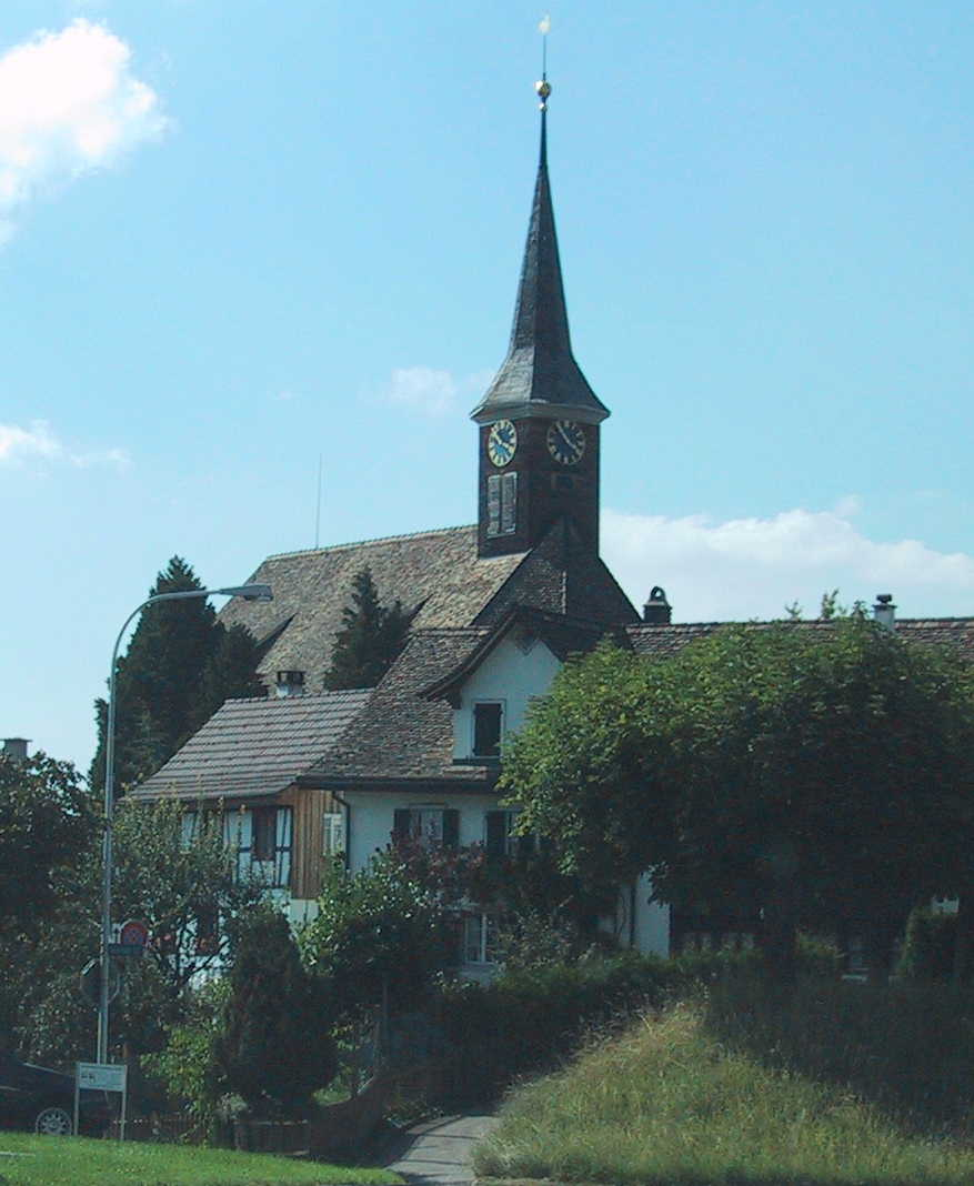 Aufnahme 17. August 2005, Dorfkirche in Zumikon, Kanton Zürich. Fotograf Peter Berger (selbst fotografiert). Lizenzstatus "GNU-FDL"